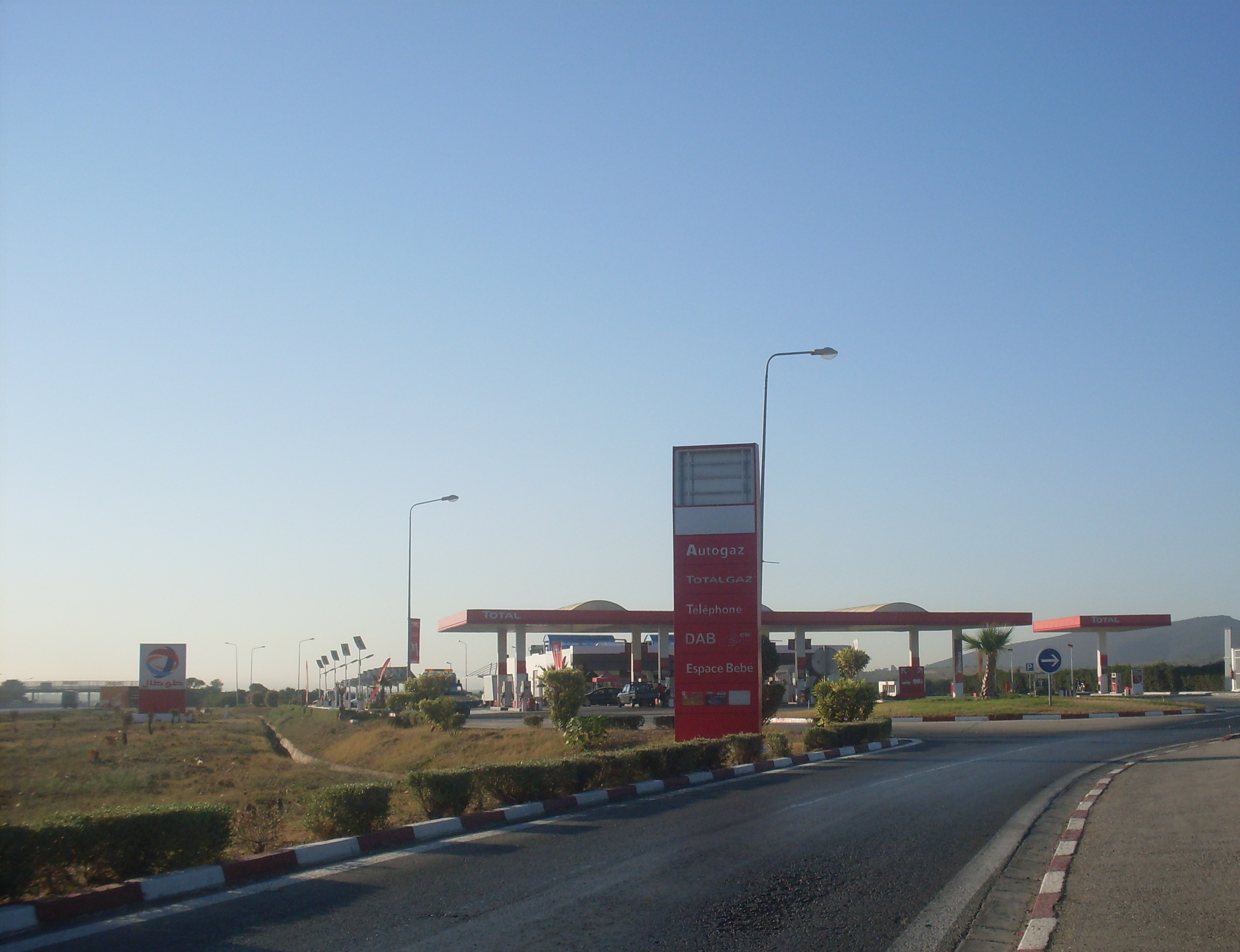 Tunisie, aire de service Total sur l'autoroute A1 au niveau de Grombalia